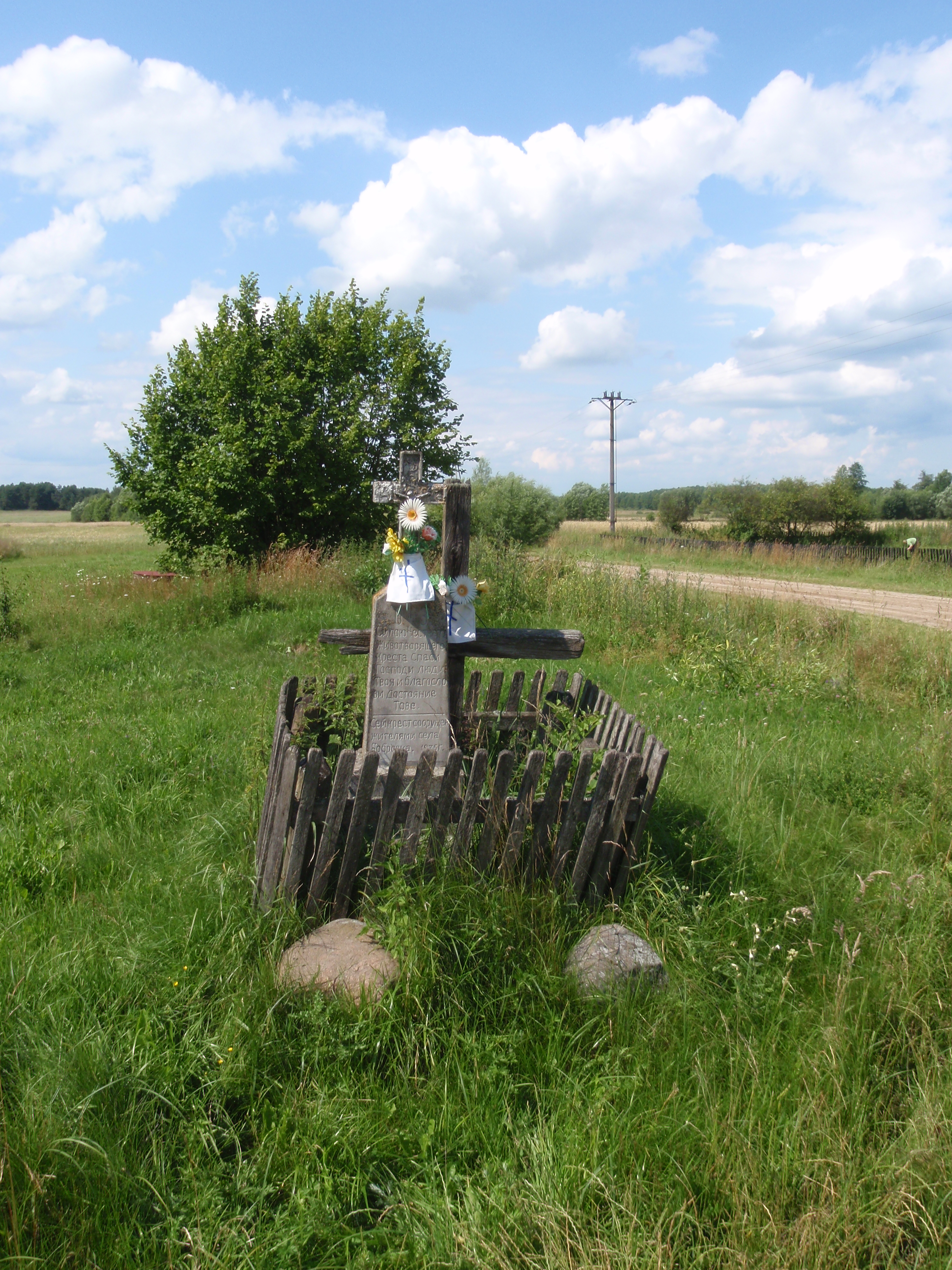 kapliczka w pobliżu końca wsi Bobrówka i wyjazd drogą gruntową